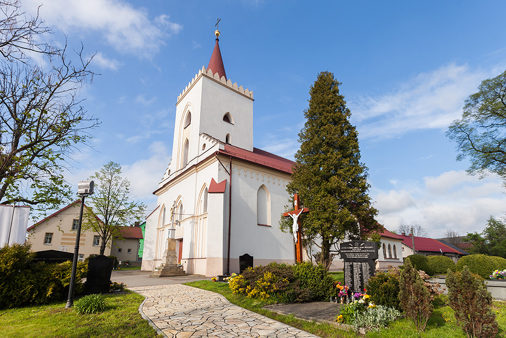 Kościół parafialny p.w. św. Jadwigi Śląskiej w Zalesiu Śląskim